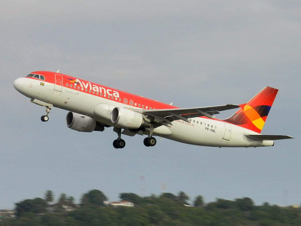 PR-ONL Avianca Brasil Airbus A320-200 - cn 5299